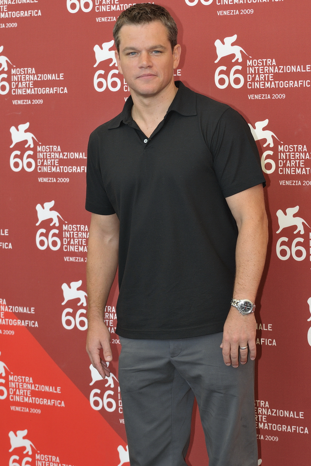 66ème Festival du Cinéma de Venise (Mostra), 6ème jour (07/09/2009) Photocall avec Matt Damon et Steven Soderbergh pour le film : The Informant